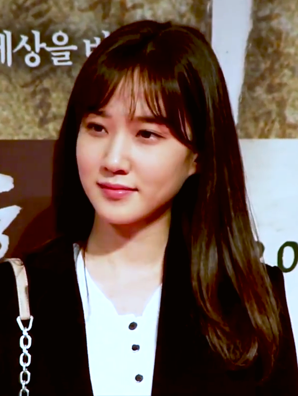 영화 '흥부' VIP시사회 포토월